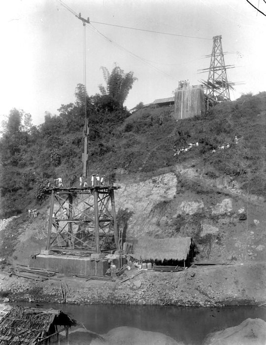 Negatief. De aanleg van de ijzeren spoorbrug over de Kali Metro op de lijn Malang-Blitar